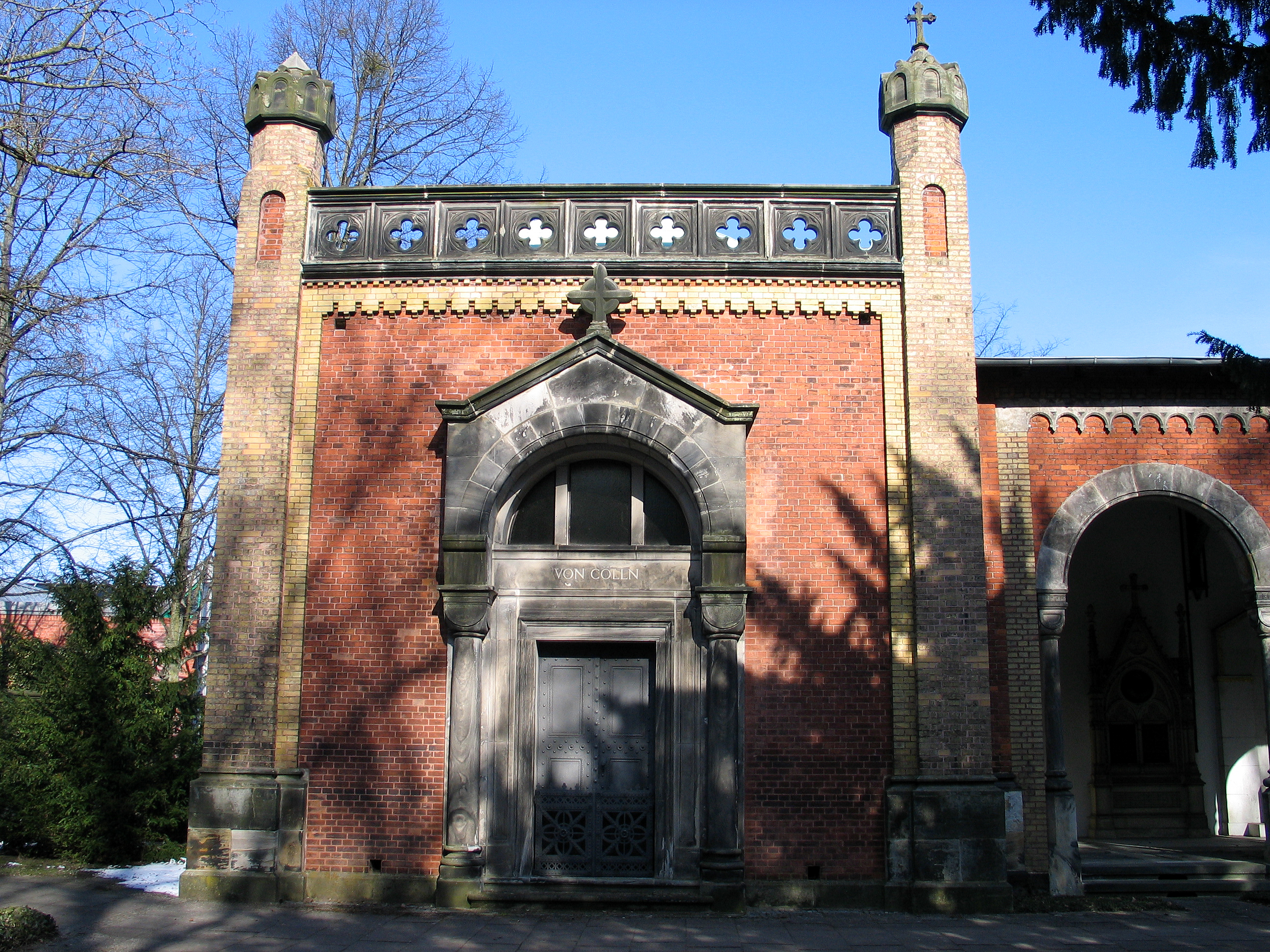 Blick auf das Mausoleum der Familie Georg von Cölln, Teil des denkmalgeschützten Eingangsgebäudes am Stadtfriedhof Engesohde in Hannover-Döhren ...